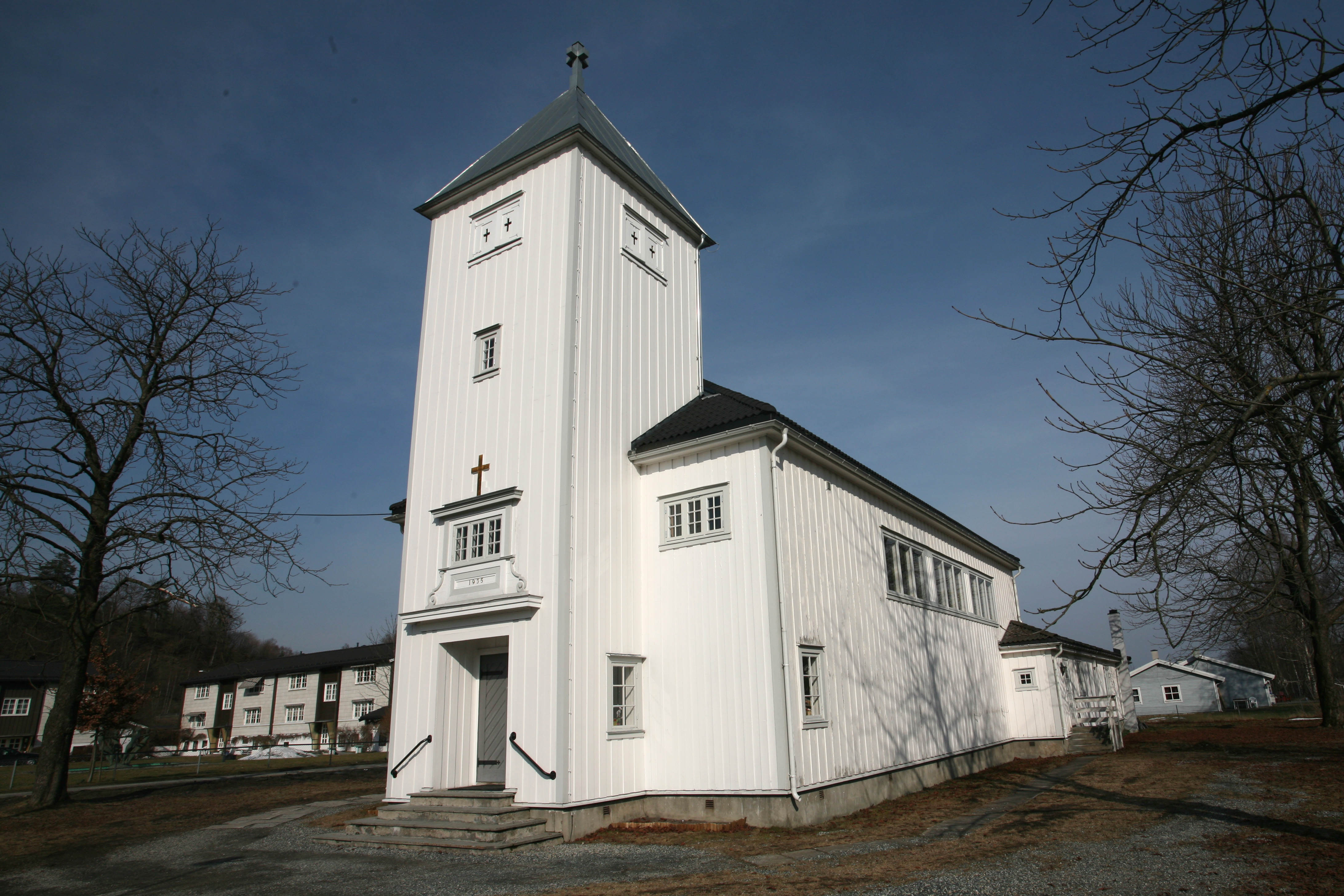 Picture of Slemmestad kirke (Buskerud - Norway)